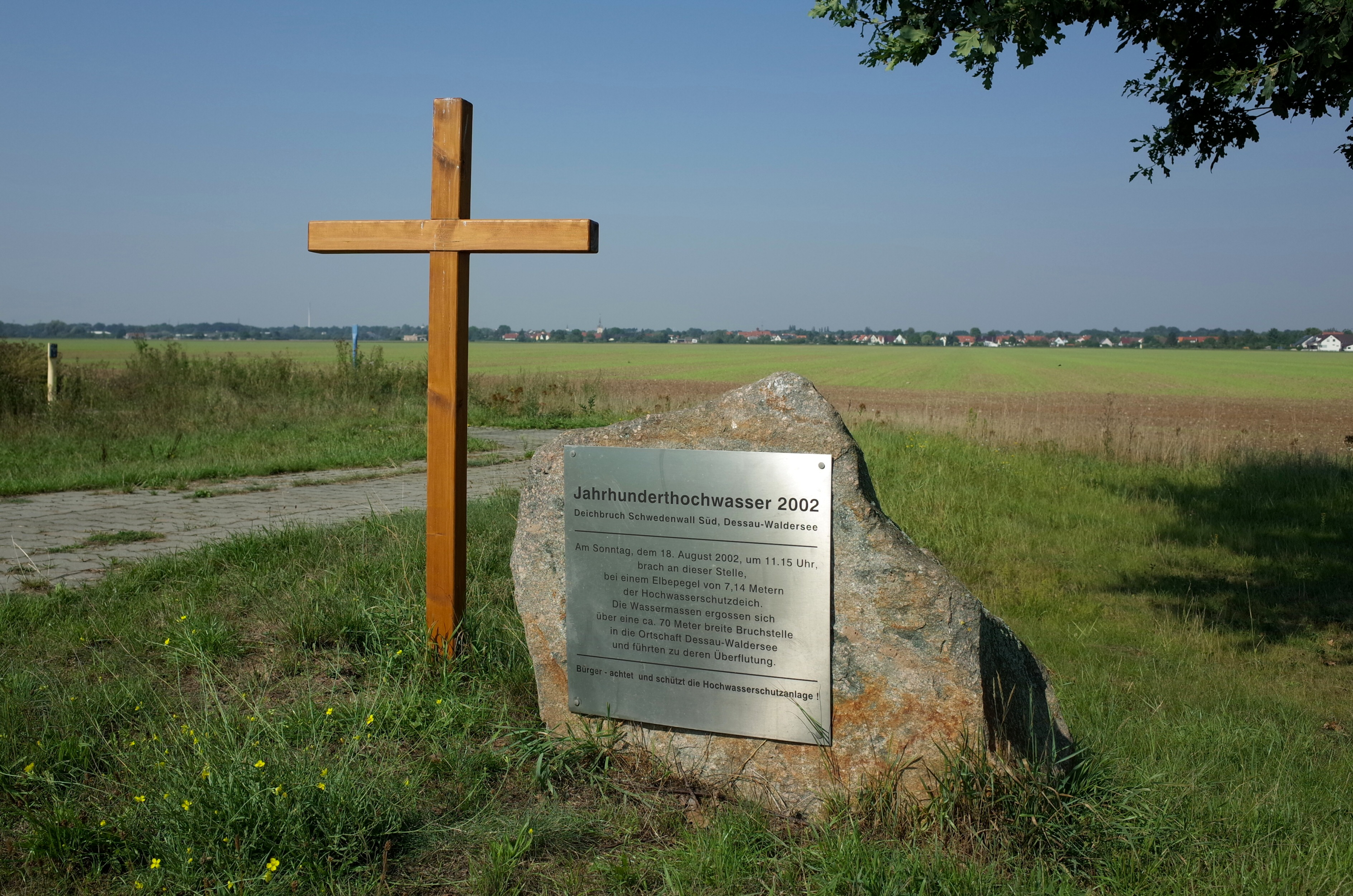 Dessau-Roßlau, Ortsteil Waldersee, Gedenkstein am Schwedenwall.